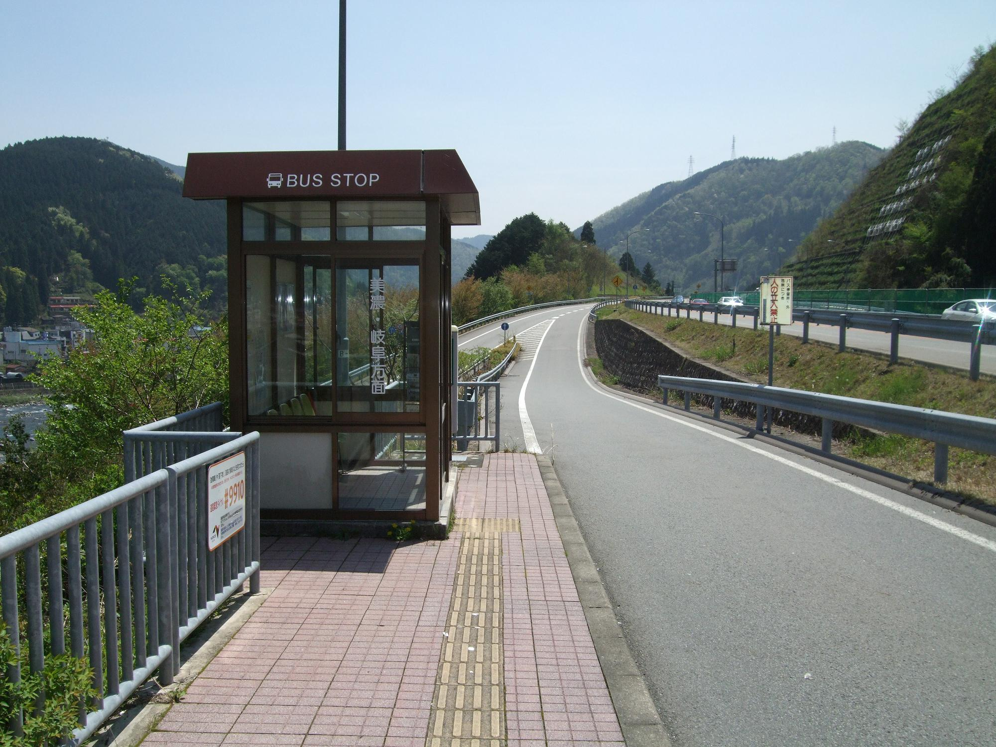 東海北陸自動車道 郡上八幡インターチェンジにあるバスストップ 2008.4.22 投稿者が撮影